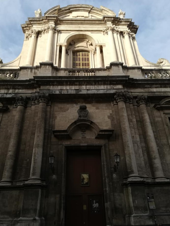 Facciata.